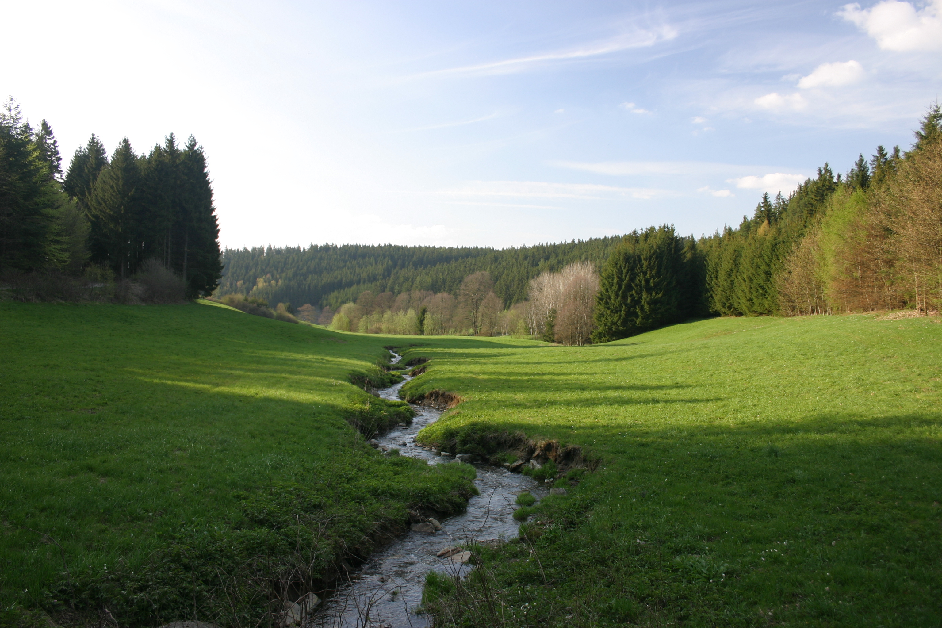 Blick in den Aubachgrund bei Schauenstein (Frankenwald)